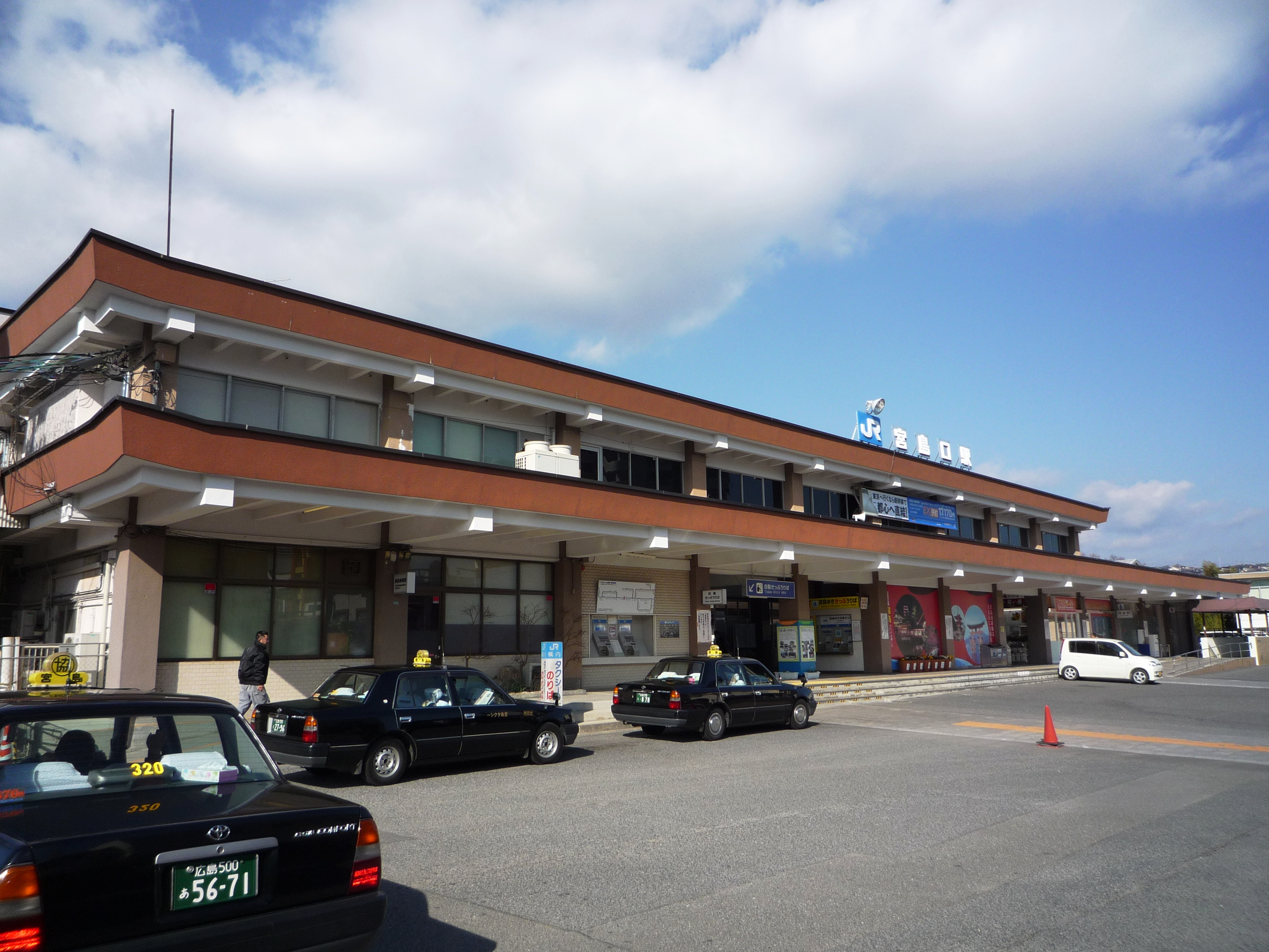 JR西日本 宮島口駅